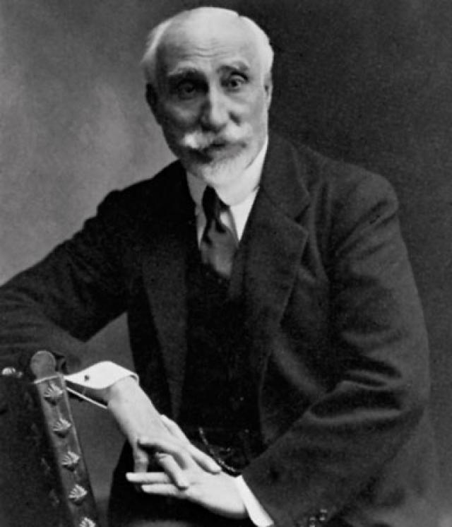 Antonio Maura, político conservador español durante el régimen de la Restauración Borbónica.